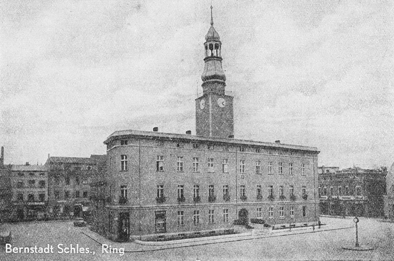 Ratusz na rynku w Bierutowie (Bernstadt in Schlesien)